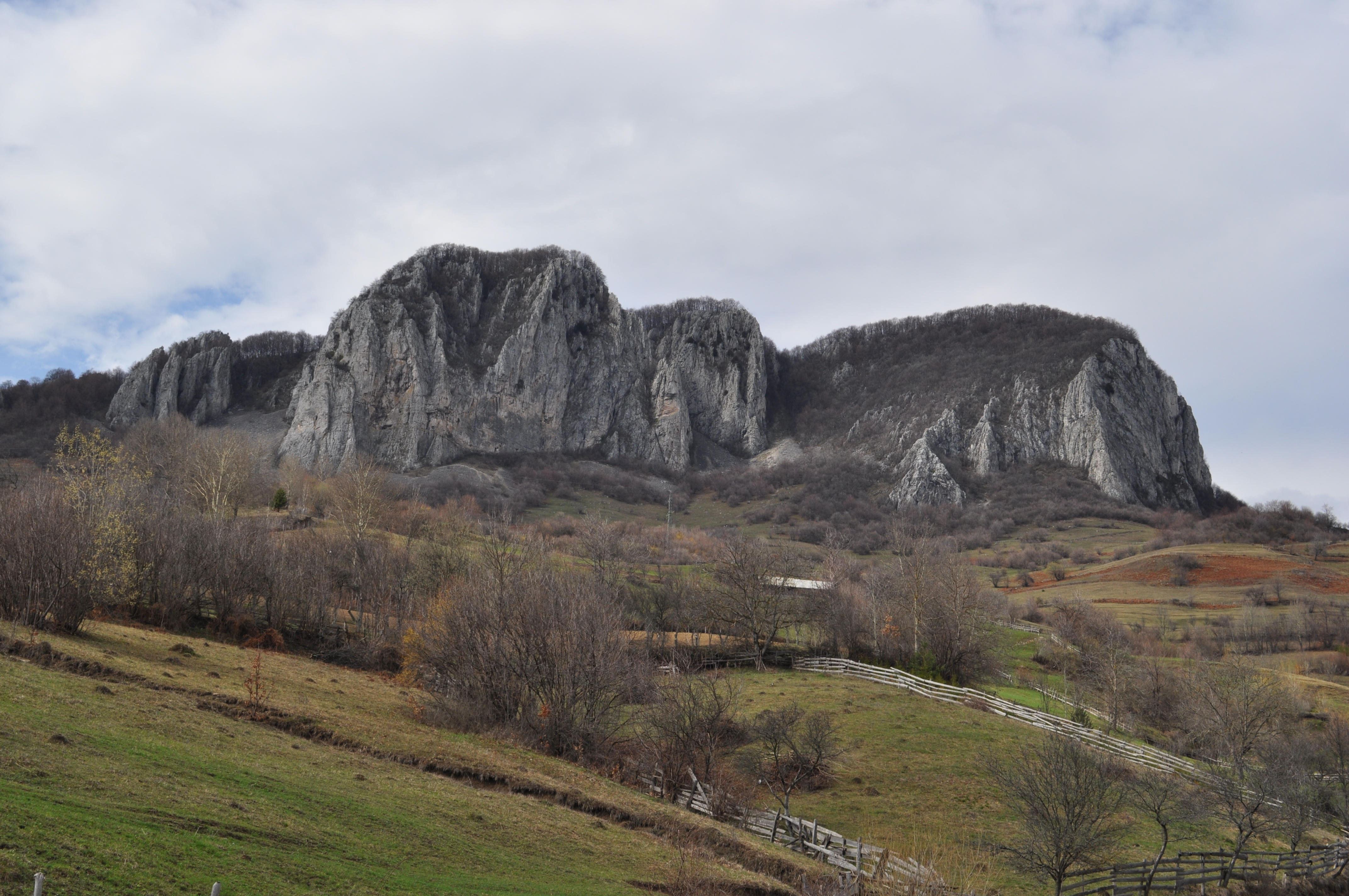 Muntele Vulcan